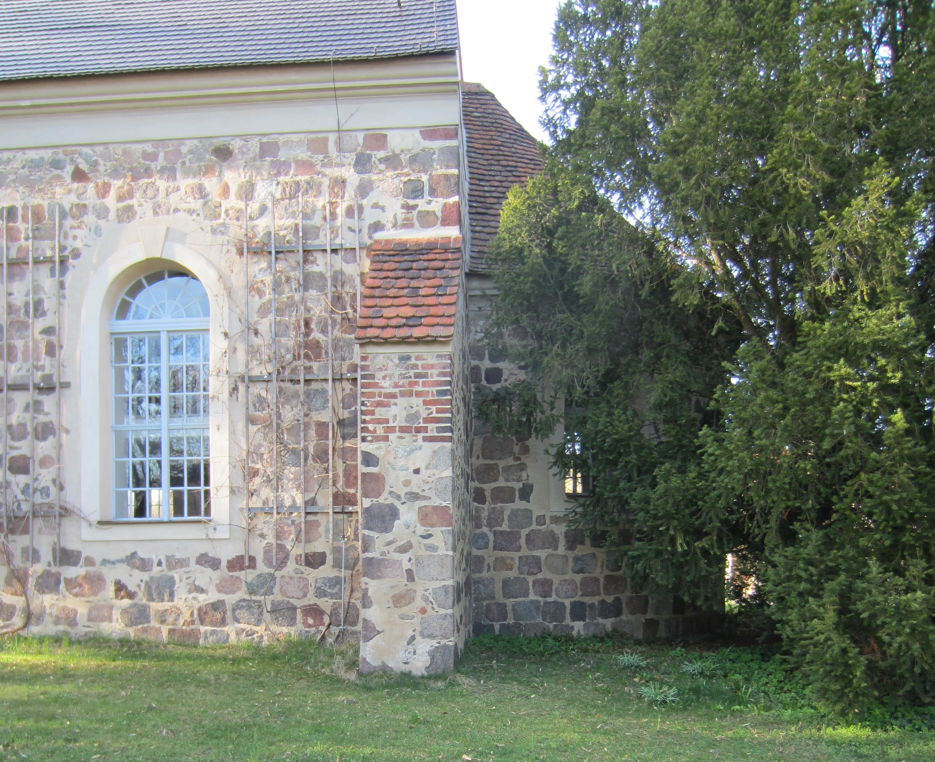 Langengrassau, Gemeinde Heideblick, denkmalgeschützte Dorfkirche, Apsis